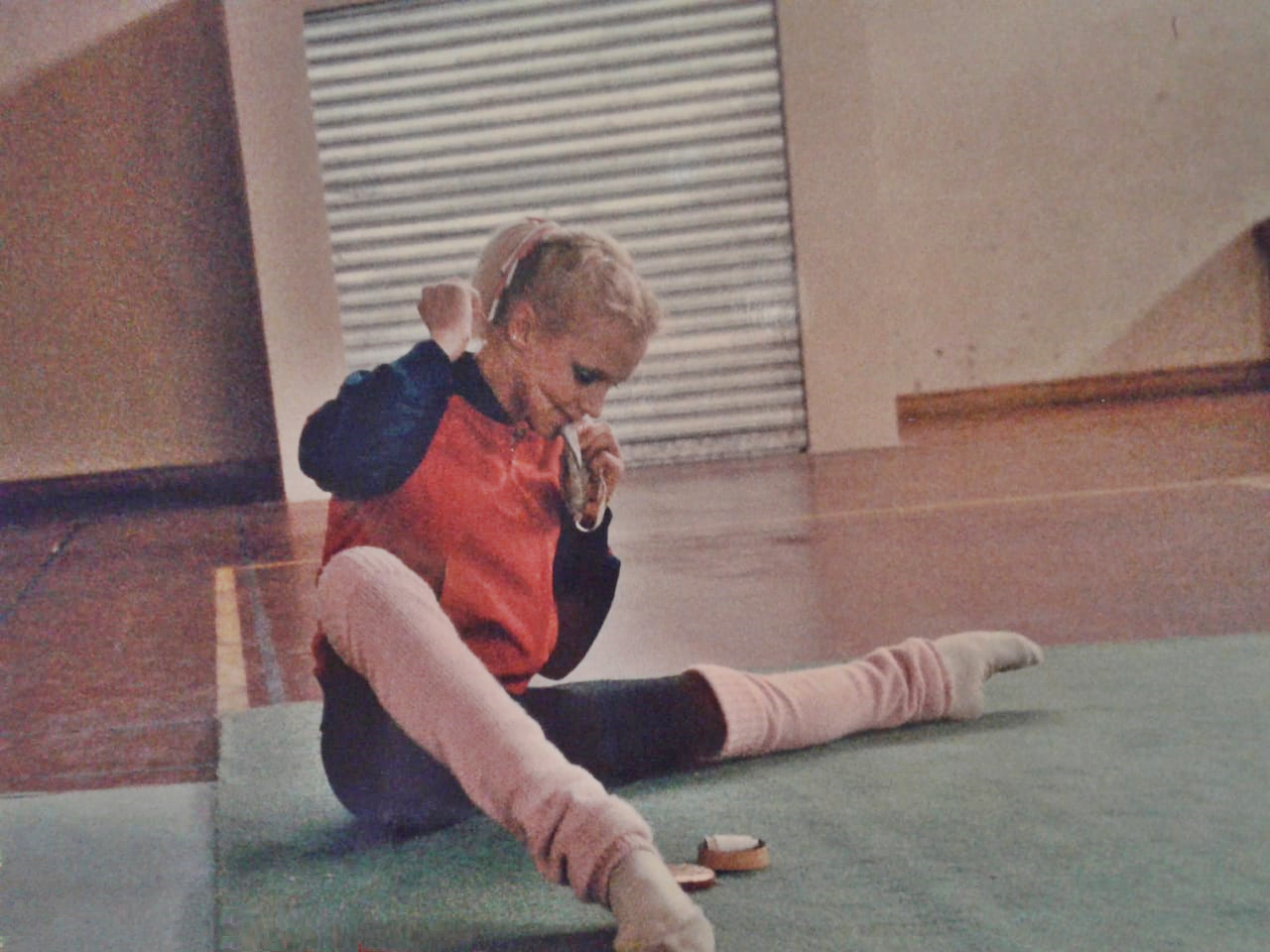 La gimnasta soviética Galina Beloglazova cosiendo una de sus punteras en el Mundial de Valladolid en 1985.